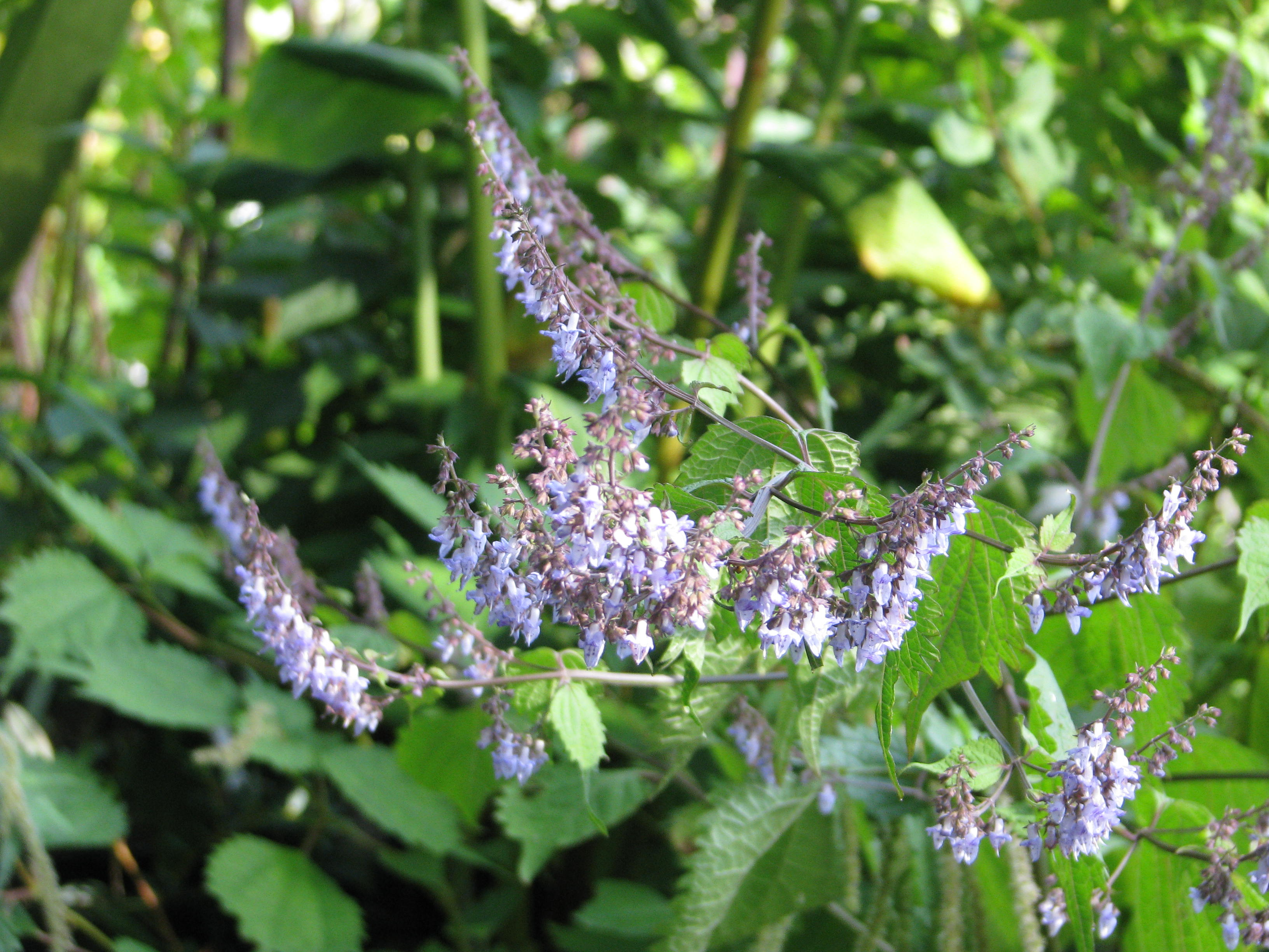 Plectranthus excisus